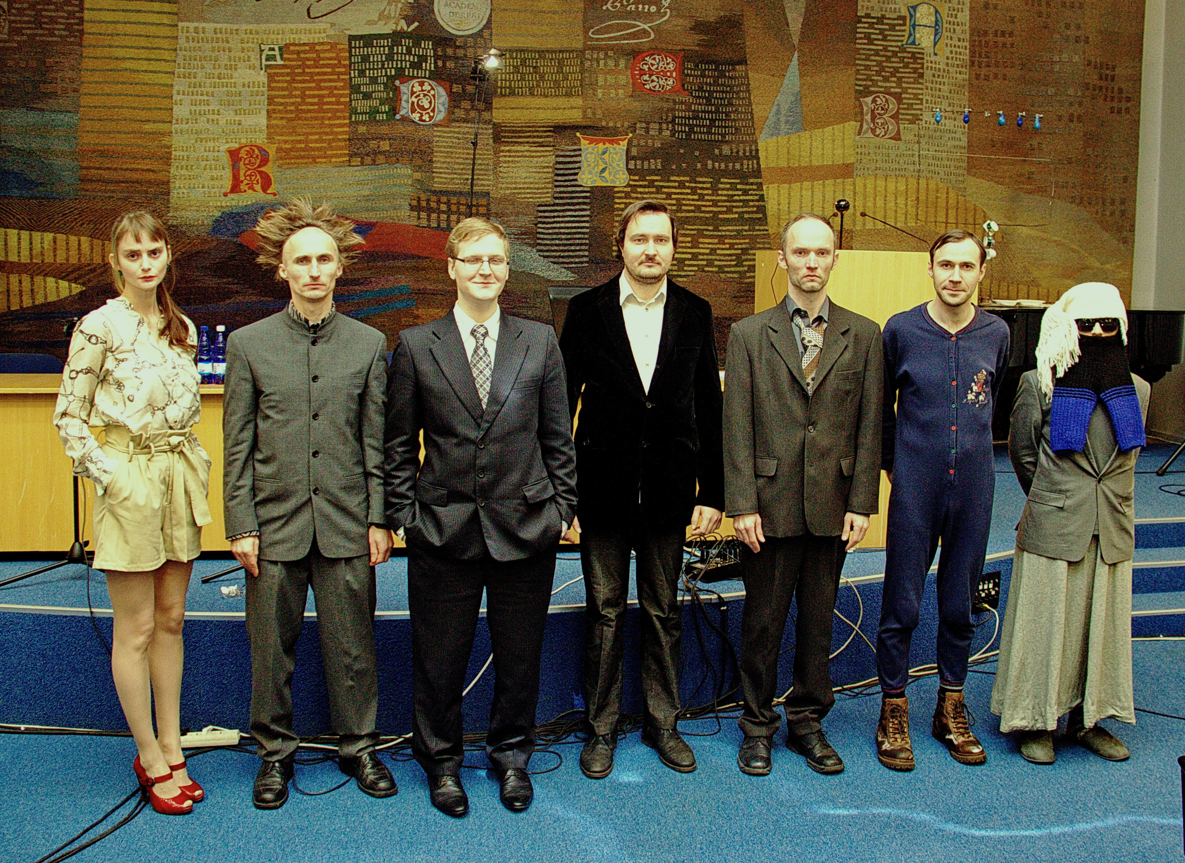 Rahvusvaheline konverents, teaduslik konverents 2012. Grupipilt.